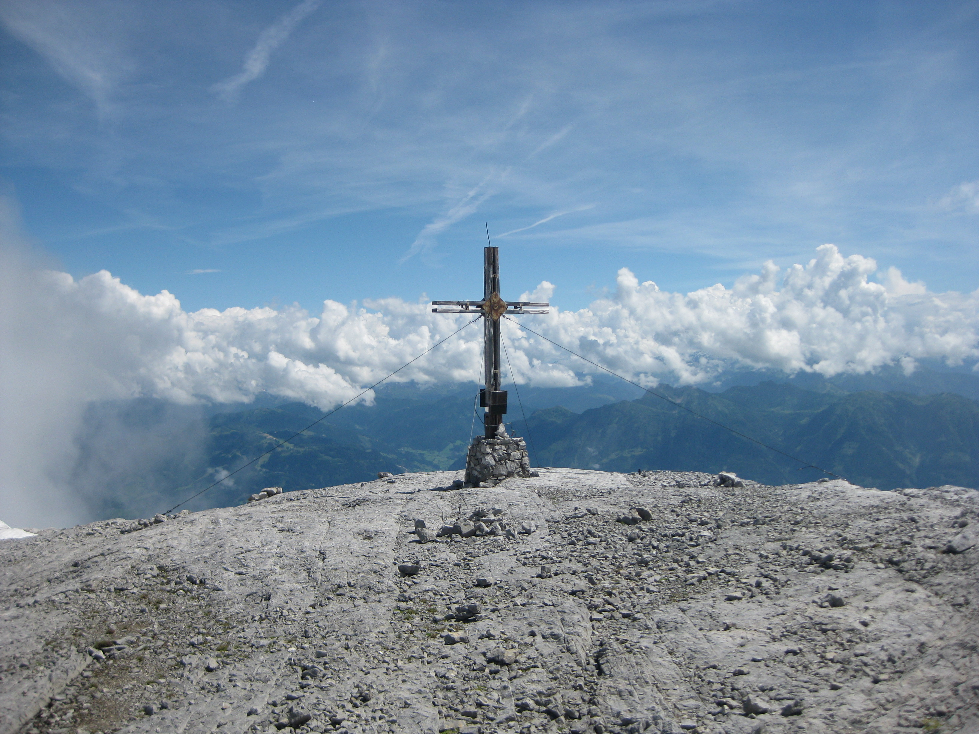 Großer Bratschenkopf